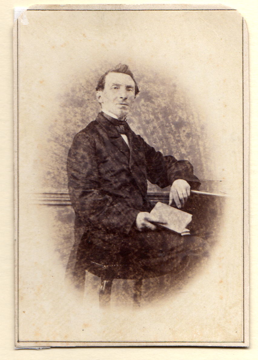 Frederik Böger. Ca. 1864. Tekening.